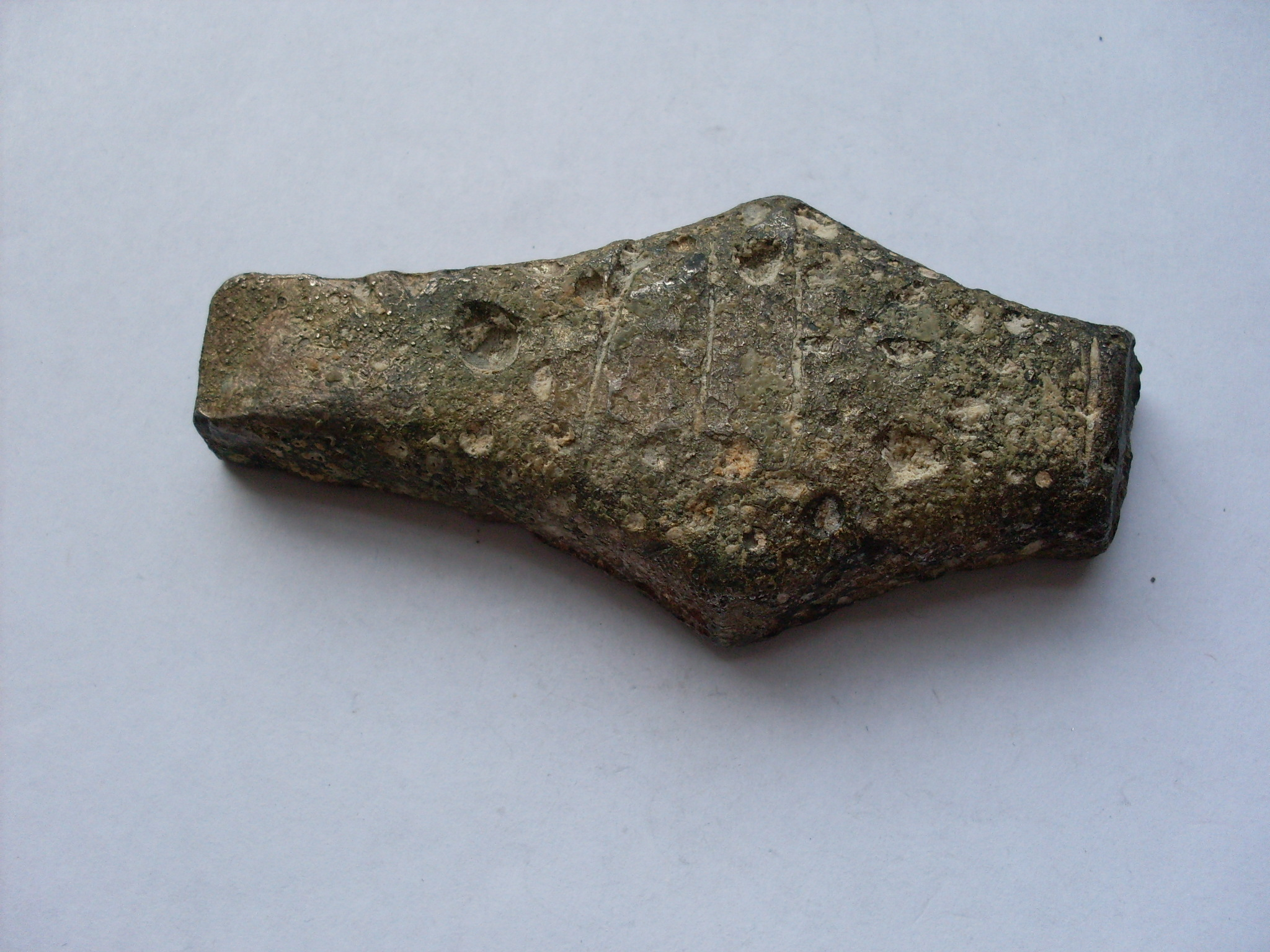 Як грошово – лічильна одиниця гривня виникла ще за часів Київської Русі, орієнтовно в ХІ столітті. Сама ж назва «гривня» походить від назви прикраси з золота або срібла у вигляді обруча, який носили на шиї ( тобто на «загривку»), і звали гривна. В ті часи існували декілька видів гривен, З ХІ ст. у Київській Русі в обігу були так звані «київські» гривни, які мали шестикутну форму і важили 150 гр. срібла – ці гроші існували до татаро – монгольського нашестя. 12 травня 1978 року мешканець міста Волноваха Жамбовський Андрій Михайлович передав у дар Волноваському краєзнавчому музею Київську срібна гривню, вже не цілу, а з одного боку відрубану. Форма ромбічна зі зрізаними кутами, тобто шестикутний литий брусок срібла вагою 154,8 гр. метал після лиття став пузирчатим. На гривні поперечні лотки. Вона є гордістю нашої колекції, яку ми періодично експонуємо.